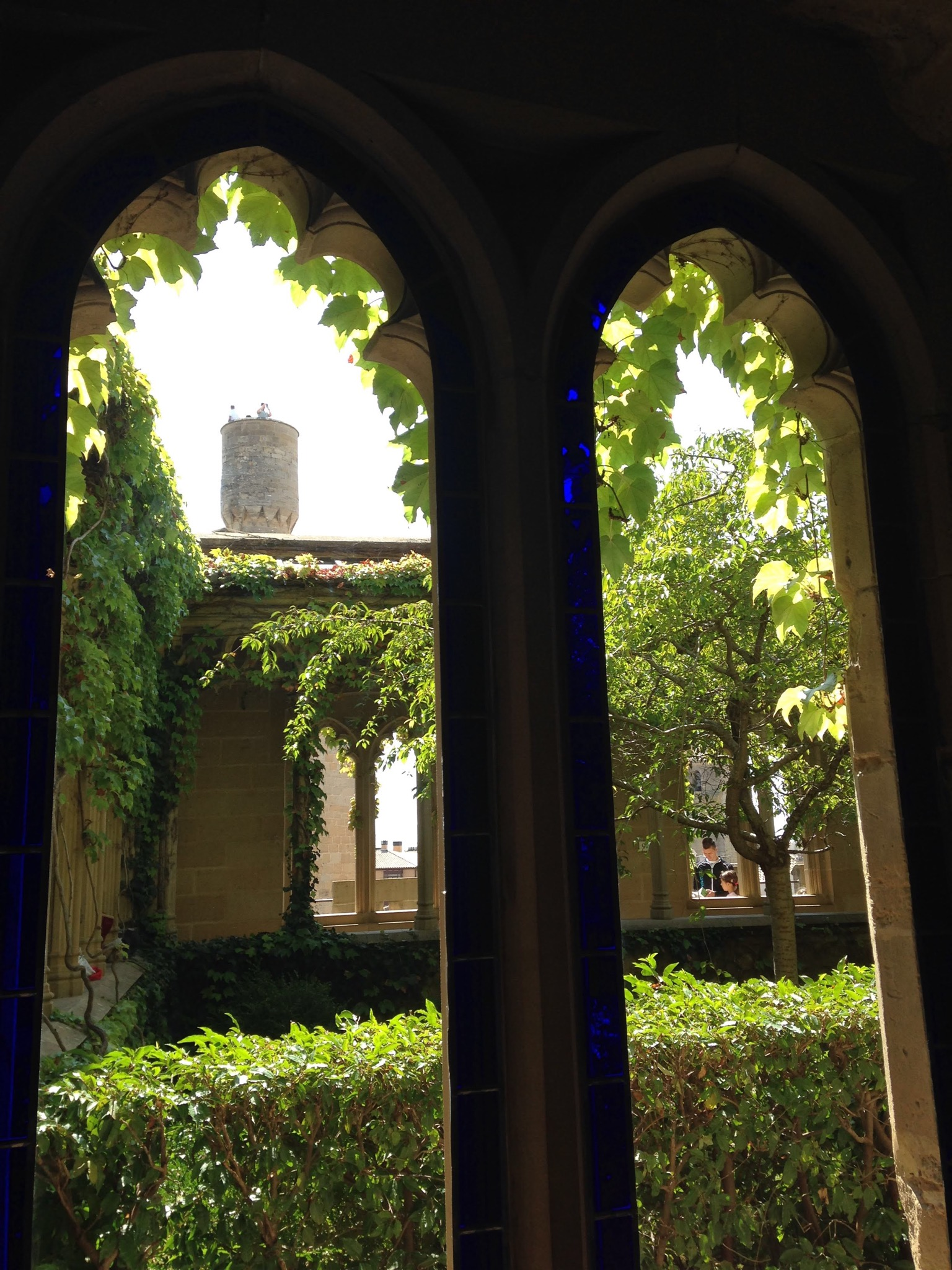 Erreginaren galeria (lorategia) Erreginaren ganberatik antzemanda, Erriberriko Errege Jauregia (Erriberri, Nafarroa)